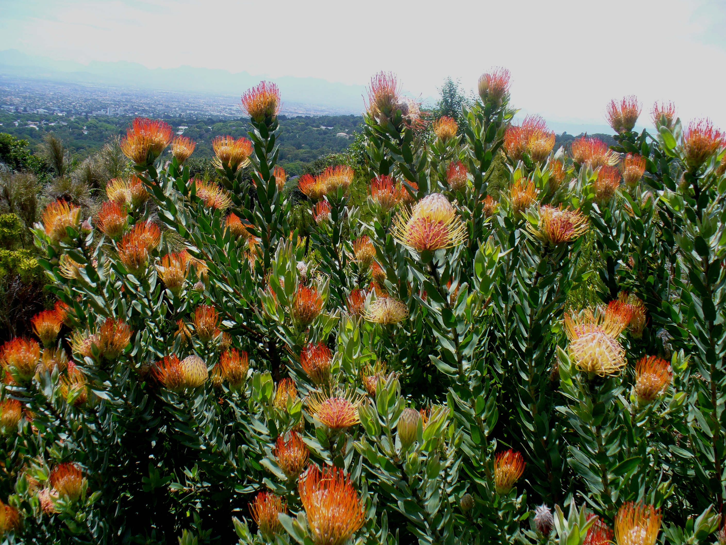 Kirstenbosch 2006 Andrew Massyn